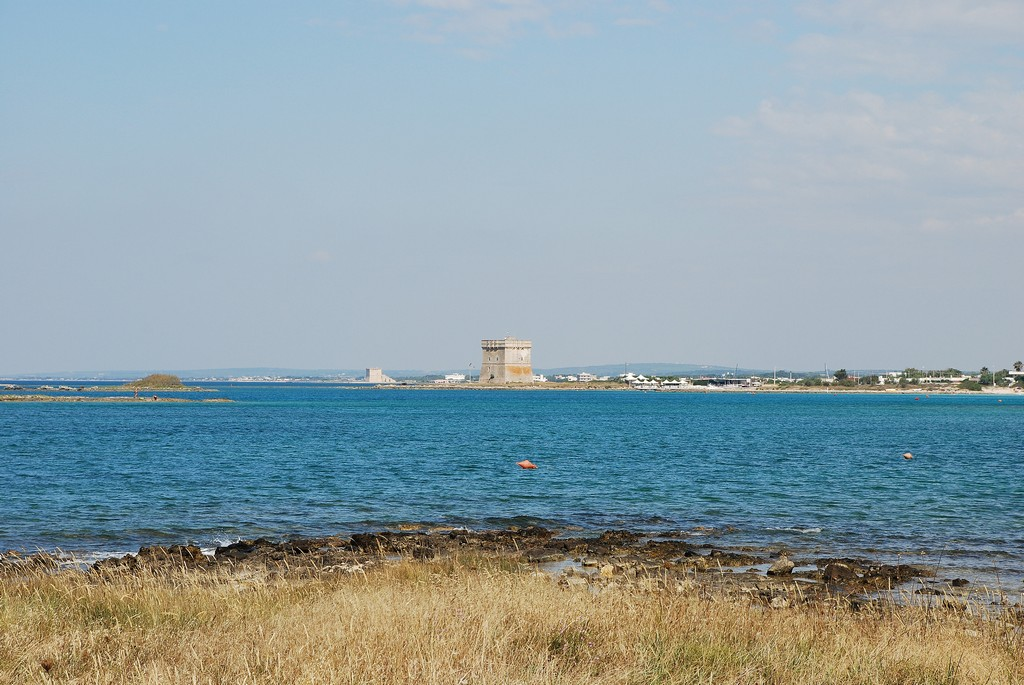 Torre Chianca near Porto Cesareo